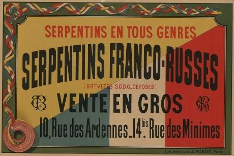 Affiche parisienne pour des serpentins.